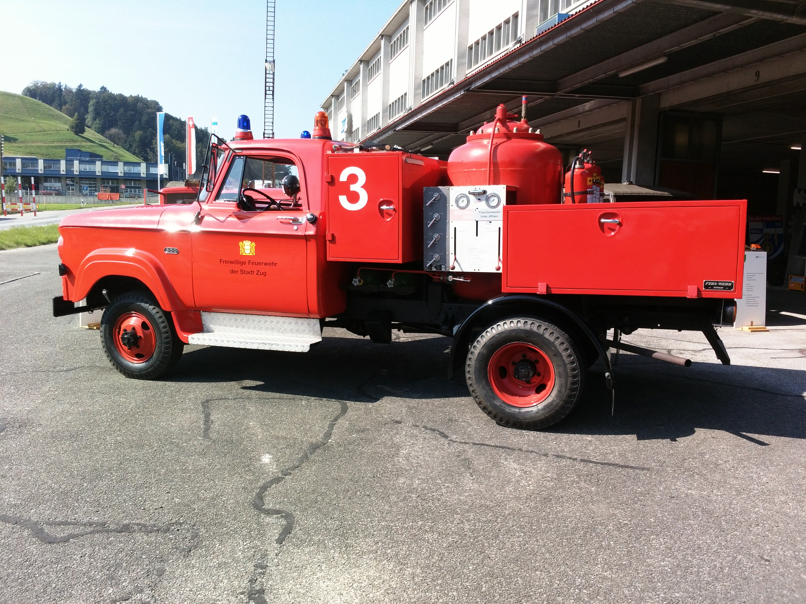 Mowag W300 Seite